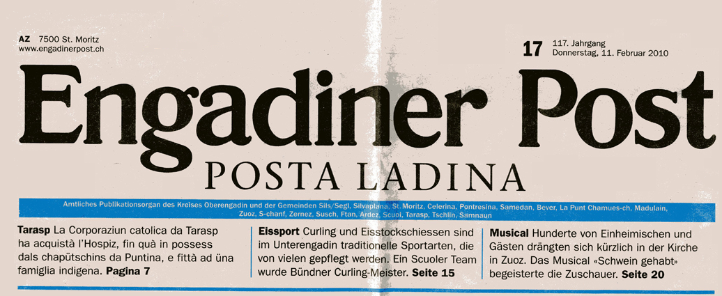 Rumantsch: Posta Ladina, San Murezzan